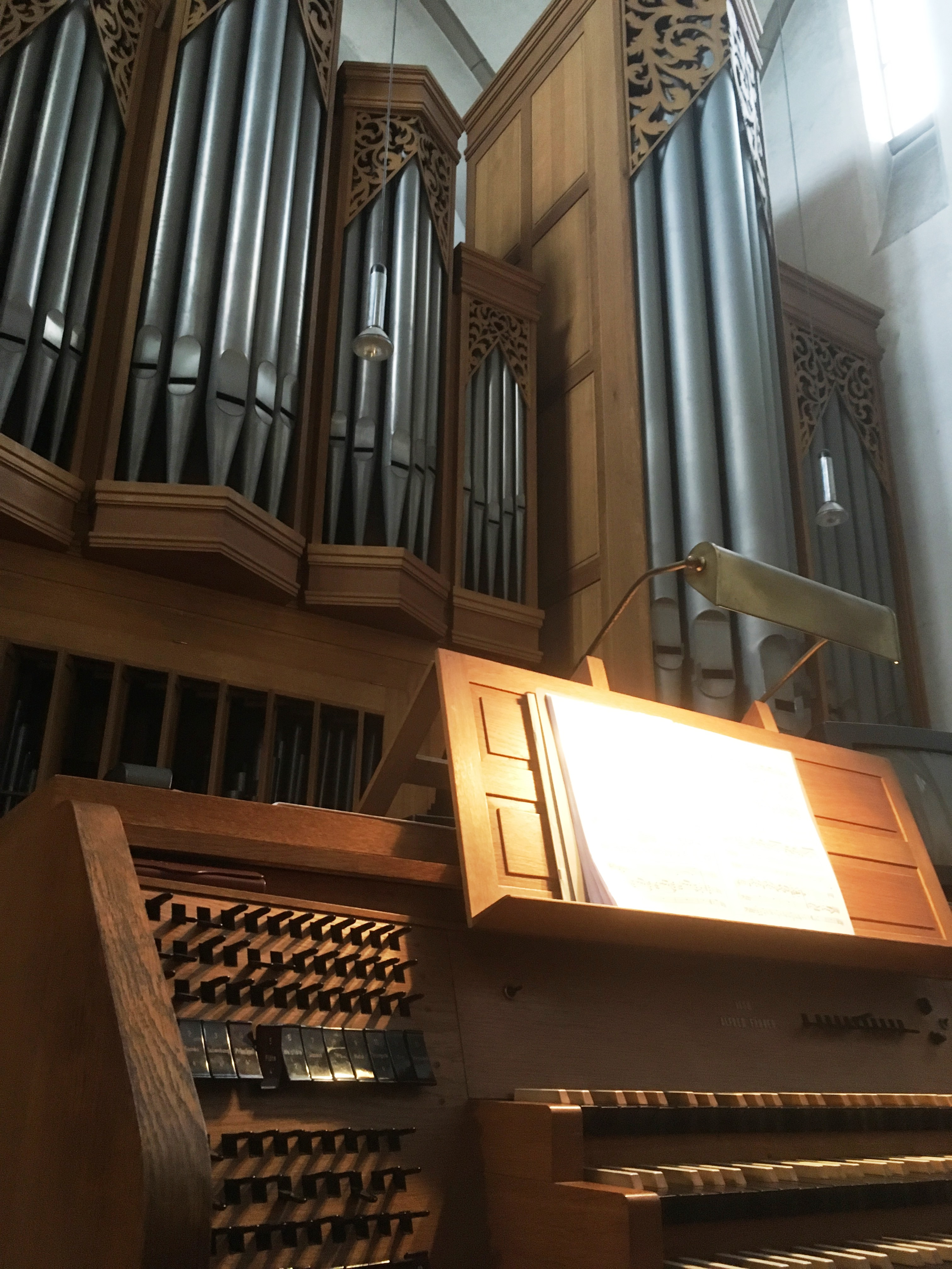 Spieltisch und Prospekt der Orgel in St. Antonius (Herten)